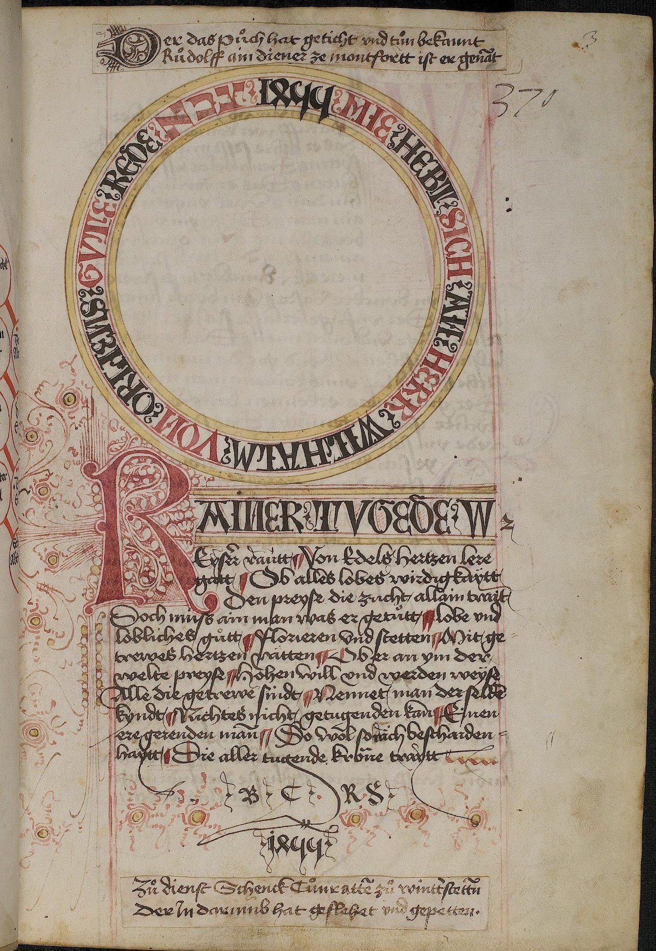 Codex Palatinus germanicus 4, Blatt 3r der Handschrift: "Rudolf von Ems, Willehalm von Orlens", Seite 1 (Titelblatt).